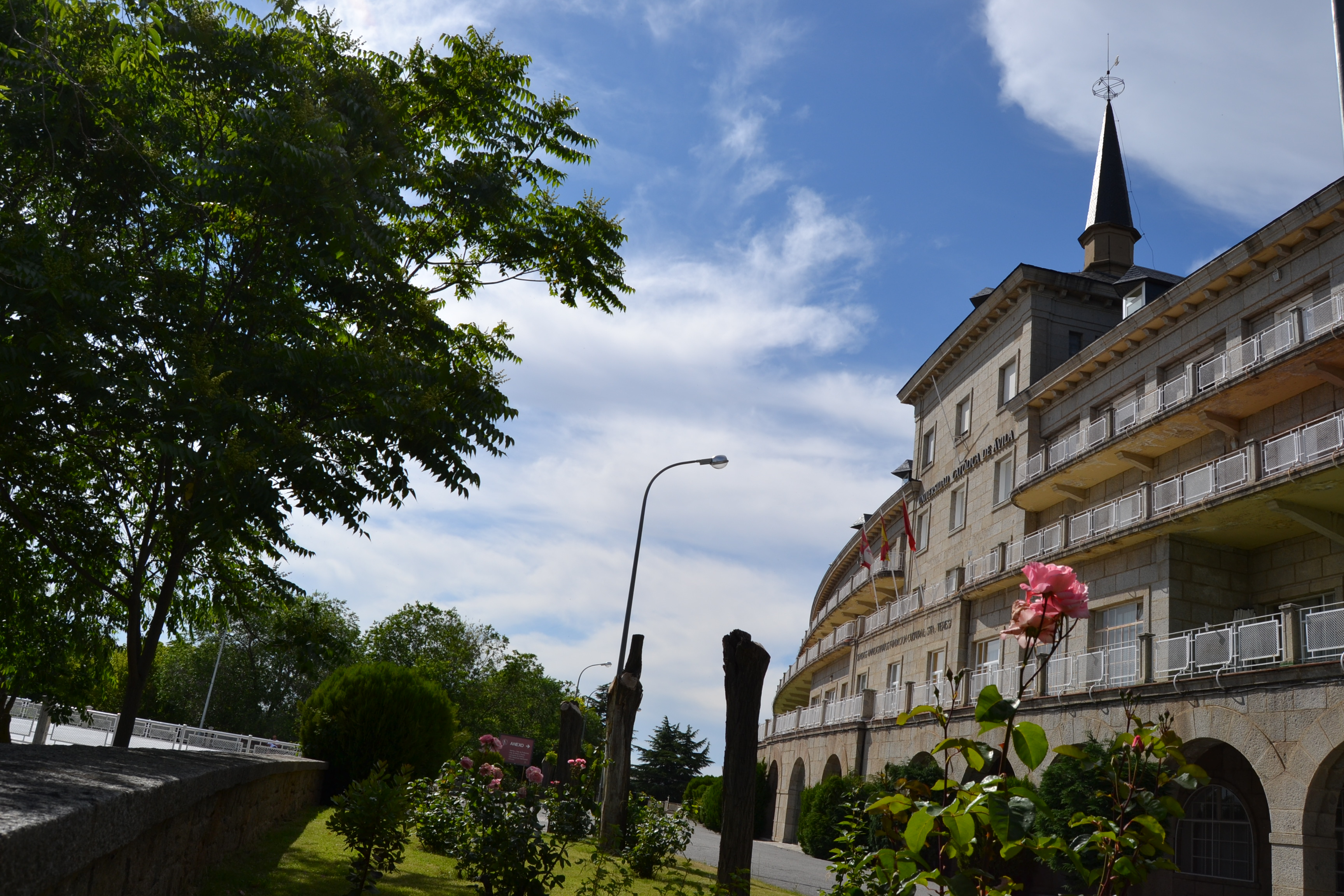 Campus calle canteros s/n